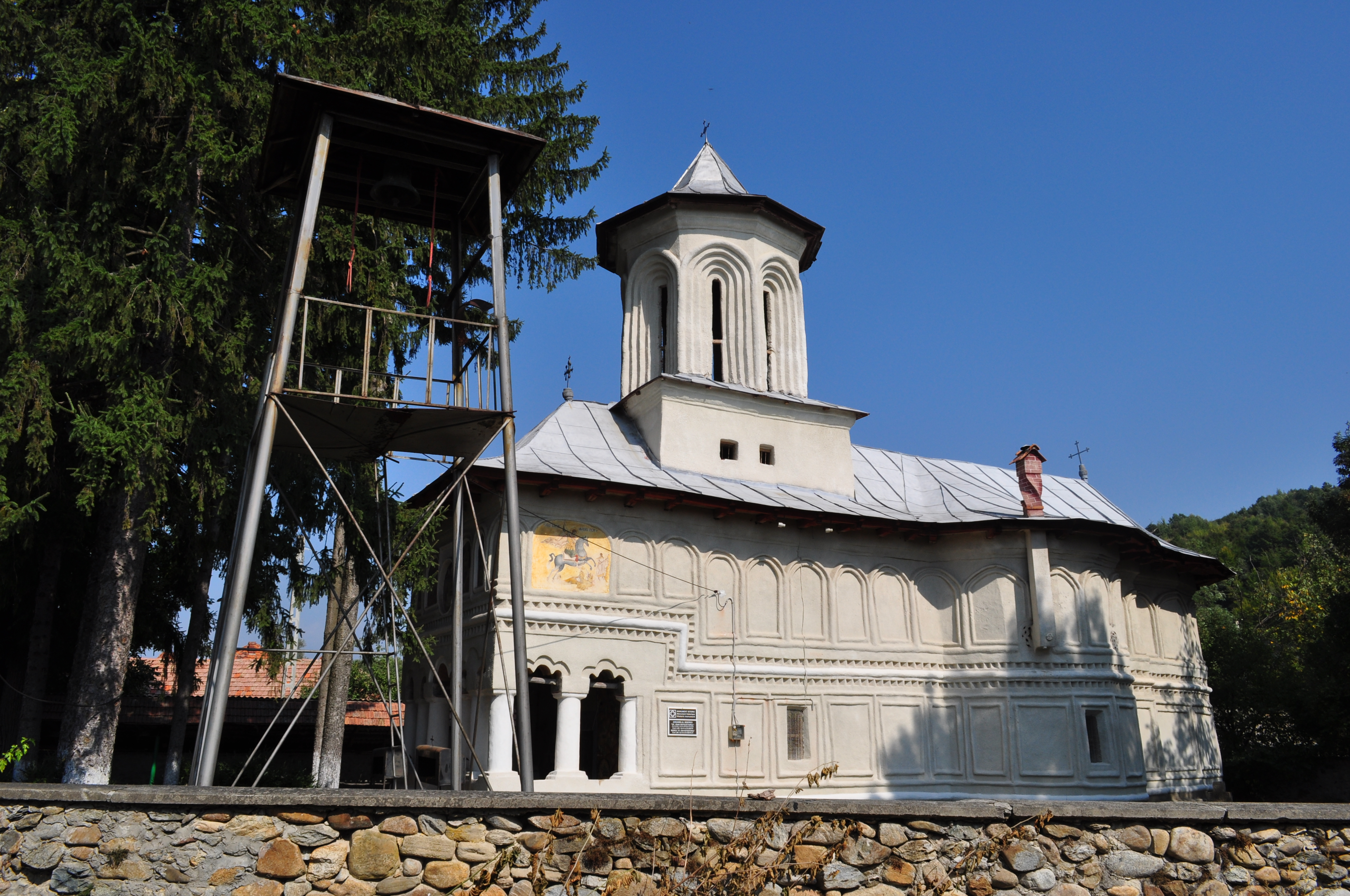 Ansamblul bisericii "Sf. Ioan Botezătorul"